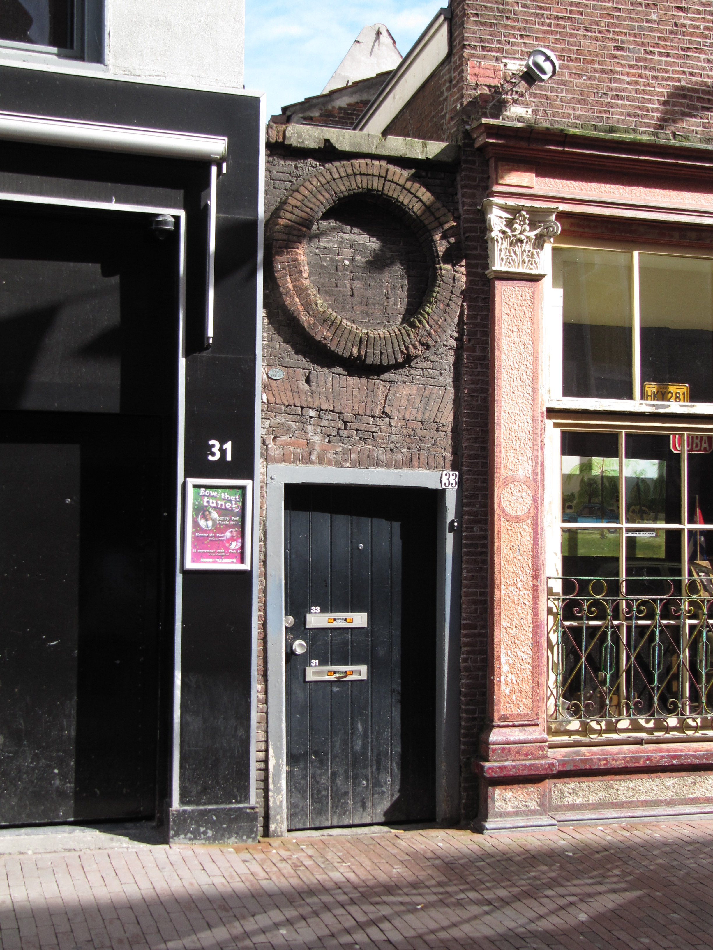 RM19695 Haarlem - Smedestraat 33 (poort).jpg